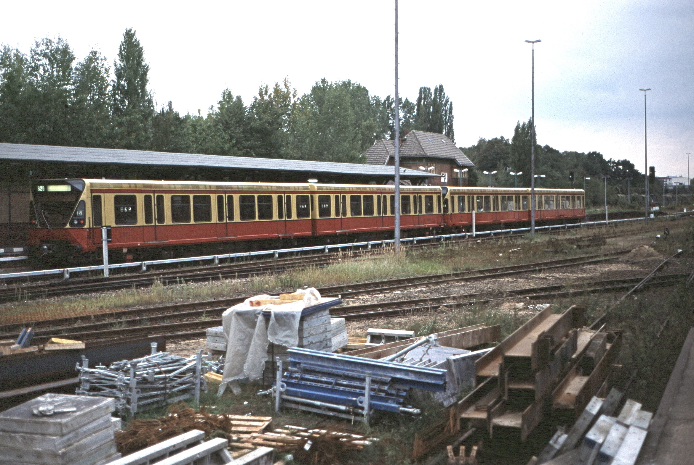 BR 480 in Berlin-Tegel